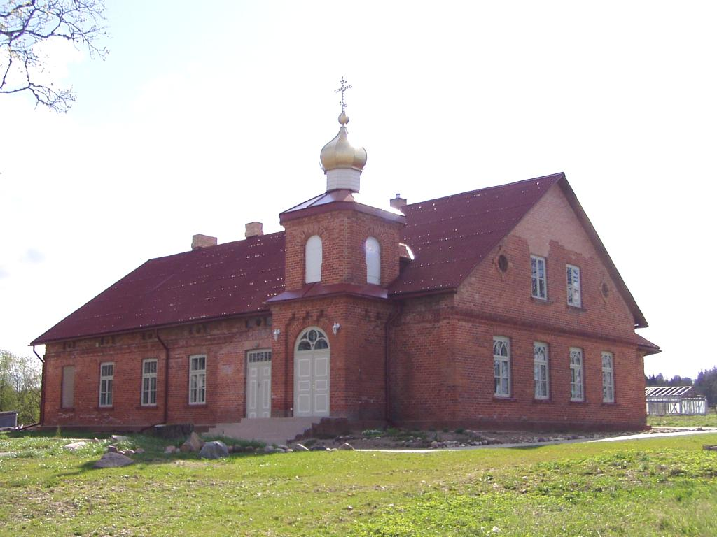 Ugāles pareizticīgo baznīca 2007-04-30